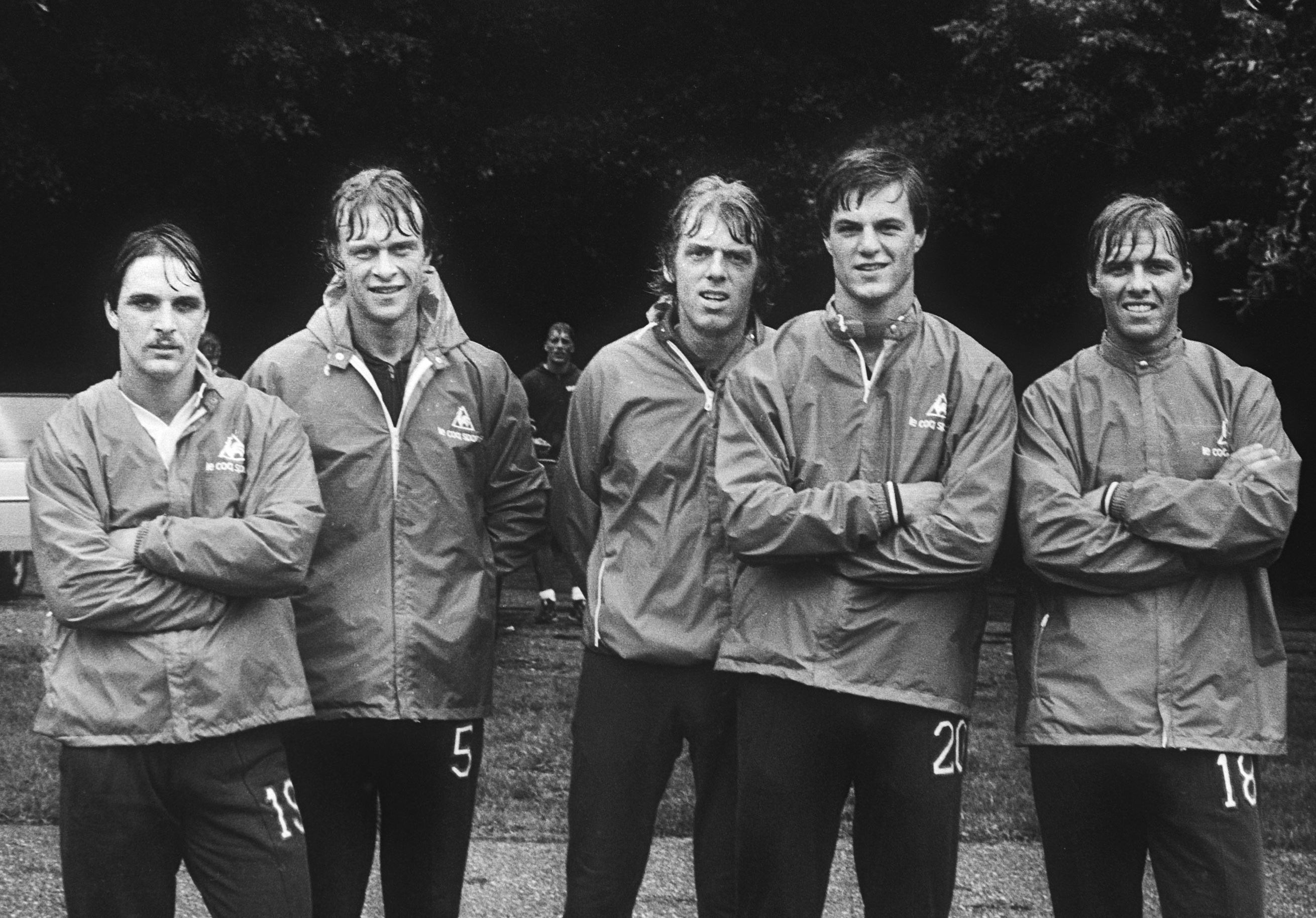 Entraînement de l'Ajax : l'entraîneur Leo Beenhakker (au centre) entouré par les nouvelles recrues (de gauche à droite) Edo Ophof, Sten Ziegler, Hans Galjé et Keje Molenaar.